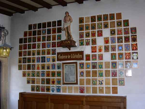 Salle de la Question, Château, Le Landeron NE Suisse, où les plaquettes des Confrères sont disposées. (on voit les plaquettes des bastiens)